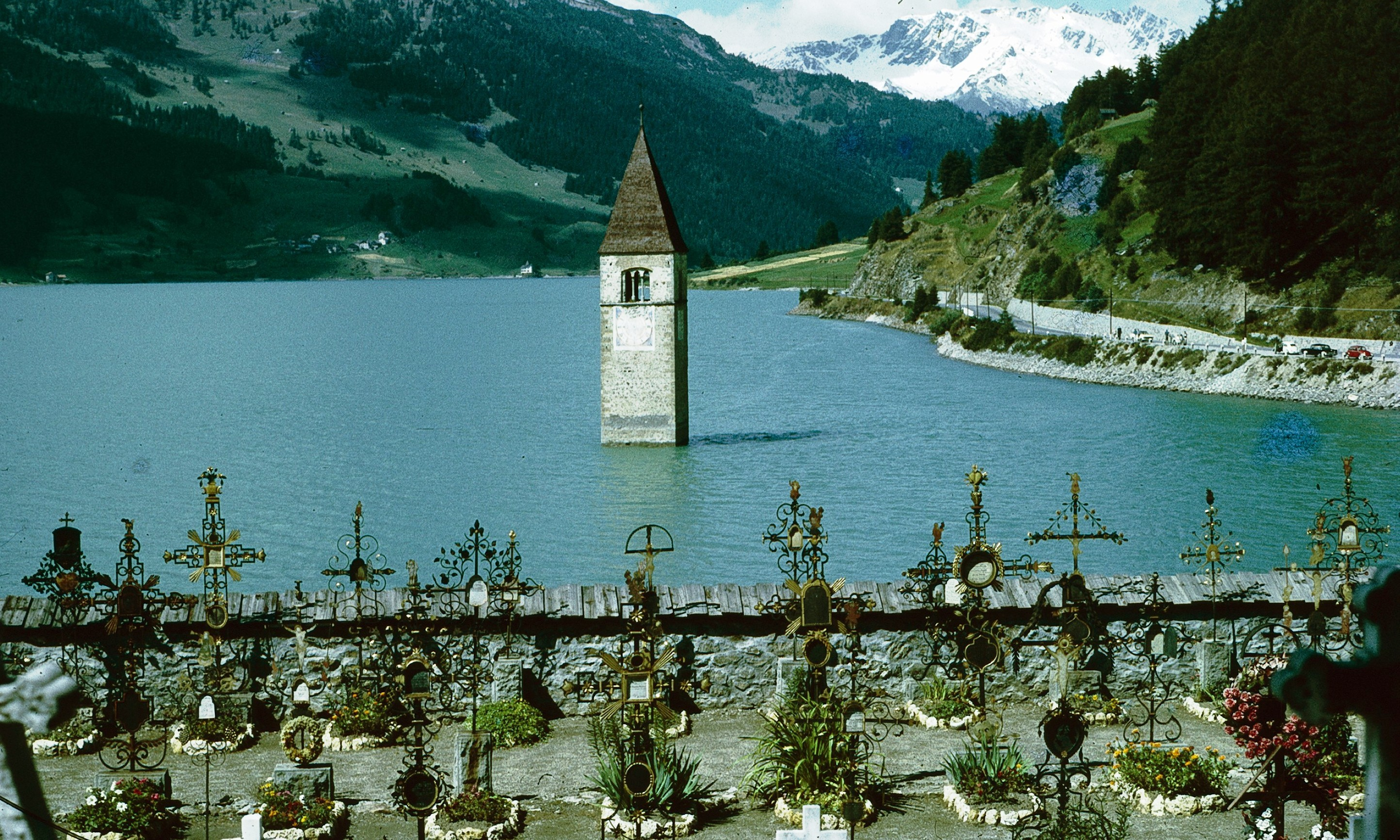 Curon Venosta mit Friedhof